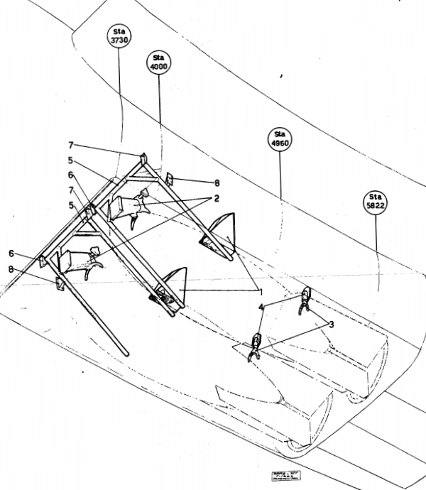 Bombgafflar till flygplanet Saab B 18